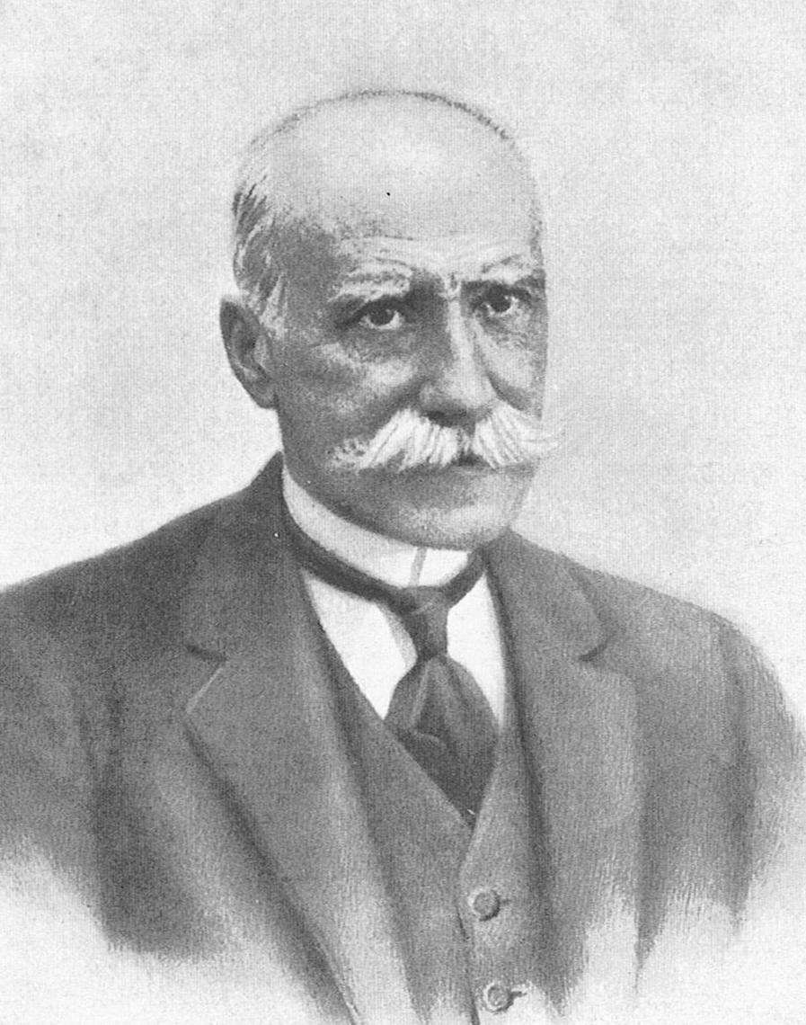 El ingeniero de minas guipuzcoano Mariano Zuaznavar y Arrascaeta (1841-1916)